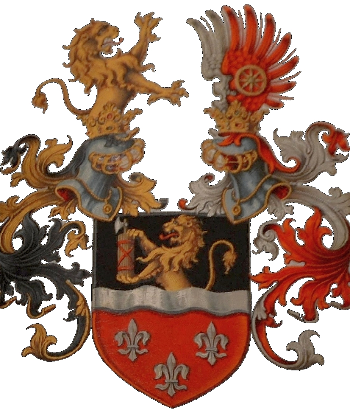 Das Wappen wurde dem aus Schärding am Inn stammenden k.k. Handelsgerichts-Präsidenten Karl Wagner (1819–1893) verliehen, als er mit dem Ritterkreuz des Leopold-Ordens ausgezeichnet und aufgrund der Ordensstatuten am 14. August 1879 als "Ritter Wagner v. Inngau" in den erblichen österreichischen Adelsstand erhoben wurde. Da er keine männlichen Nachkommen hatte, gestattete Kaiser Franz Joseph I. mit Allerhöchster Entschließung vom 14. April 1883 die Übertragung des Ritterstands, Prädikats und Wappens auf den Schwiegersohn des Karl Wagner v. Inngau, den k.u.k. Hof- und Gerichtsadvokaten Dr. Karl Koppler (1844–1918), der sich danach "Ritter Koppler v. Inngau" nennen durfte (zu Karl Ritter Wagner v. Inngau siehe Johann Ev. Lamprecht, Historisch-topographische und statistische Beschreibung der k.k. landesfürstl. Gränzstadt Schärding am Inn und ihrer Umgebungen, Schärding 1887, Teil 2, Heft 1, S. 245-246).